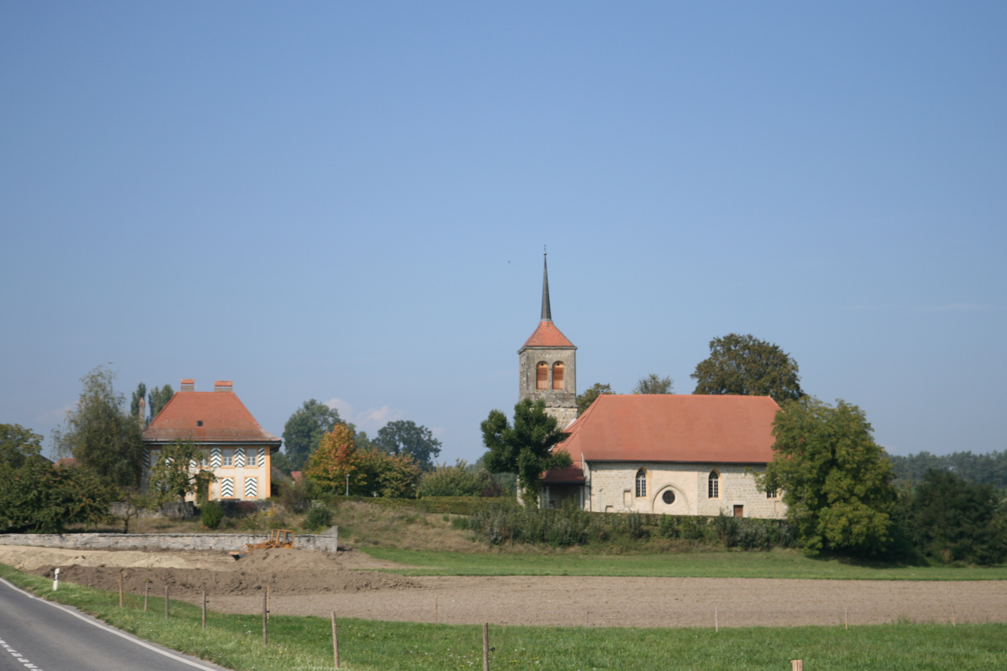 Église réformée Notre-Dame de Ressudens